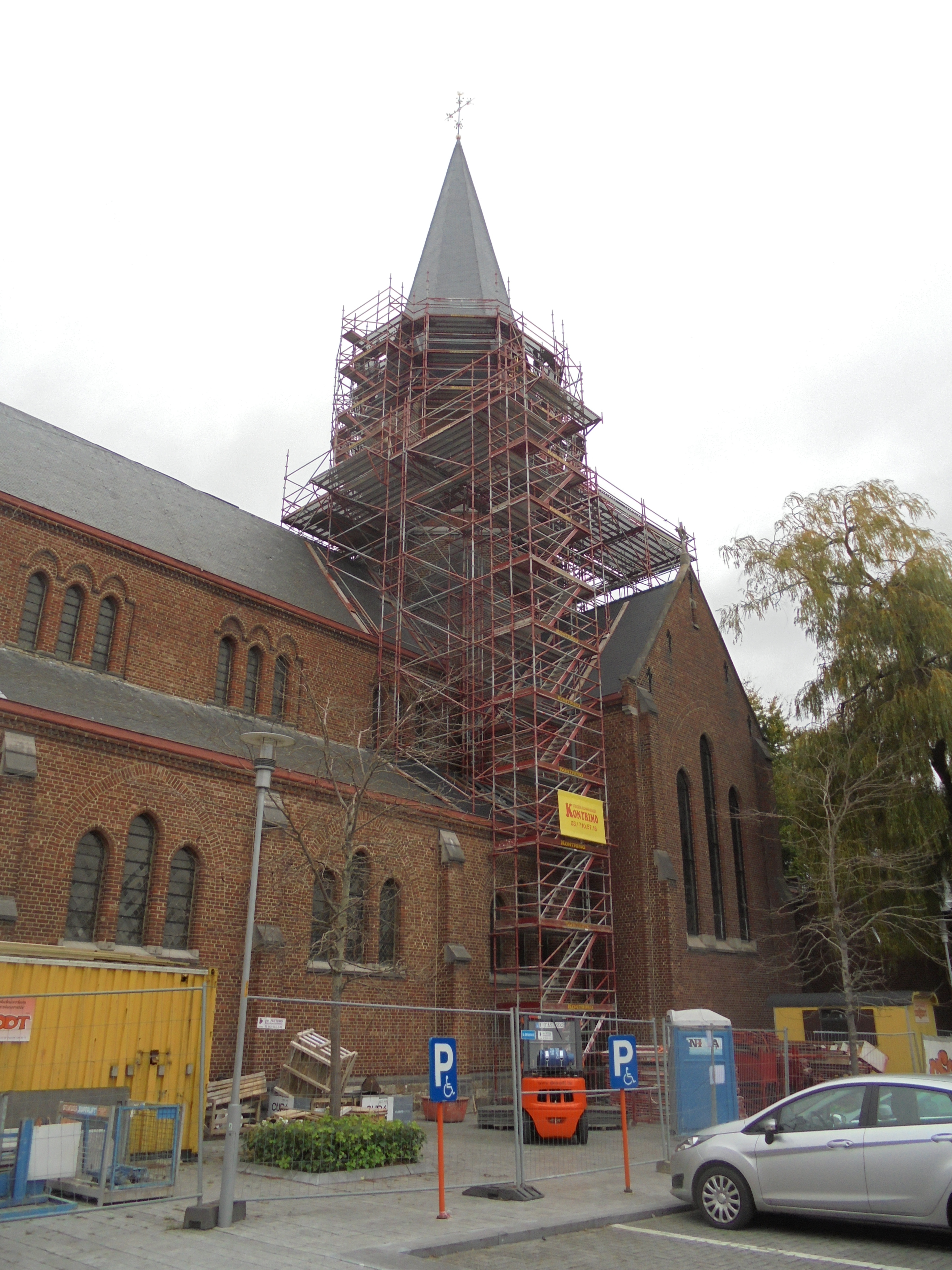 Restauratie van de Sint-Brixiuskerk (2017) - Markekerkstraat - Marke - Kortrijk - West-Vlaanderen - België